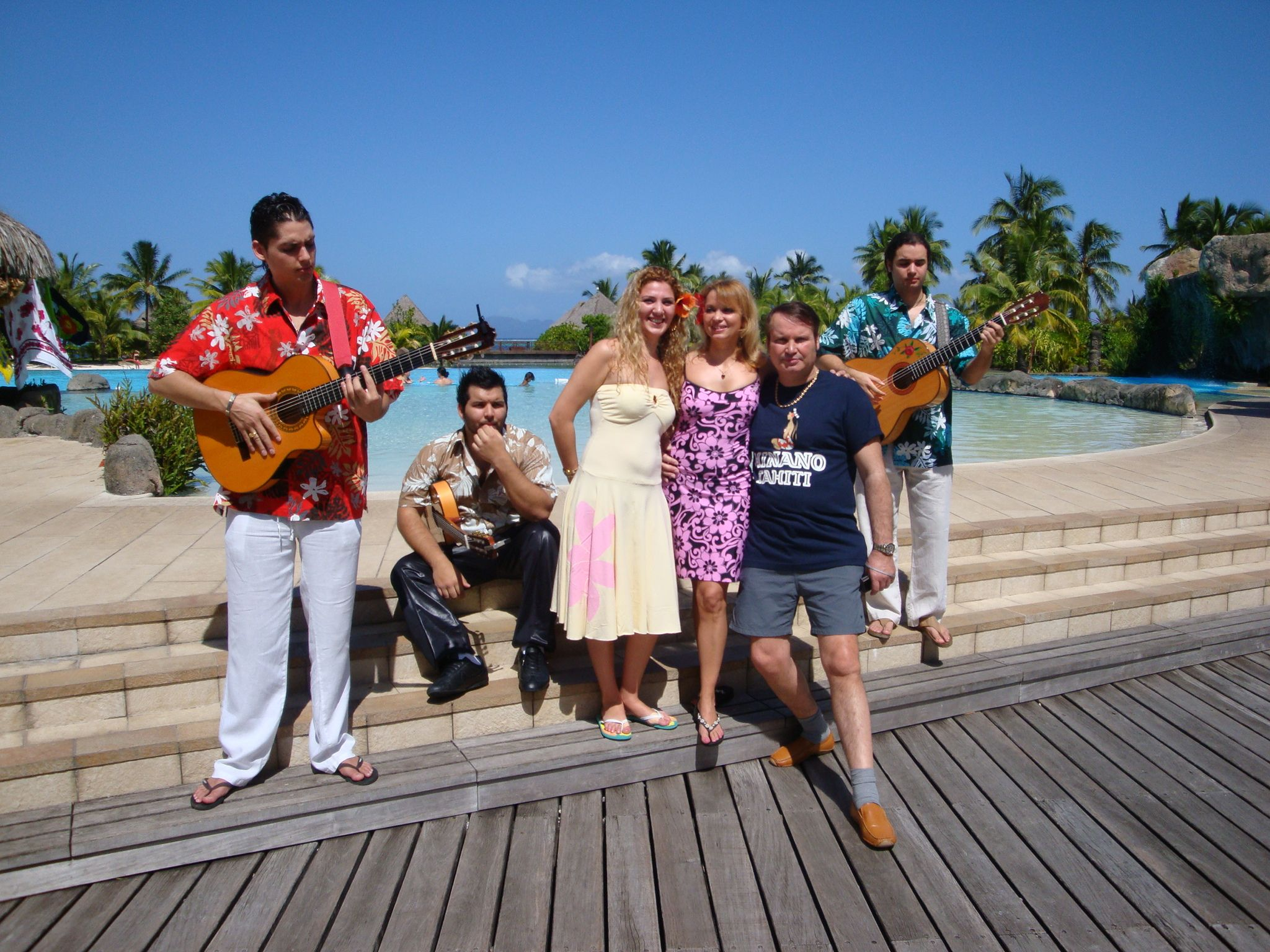 uiyruiyrui